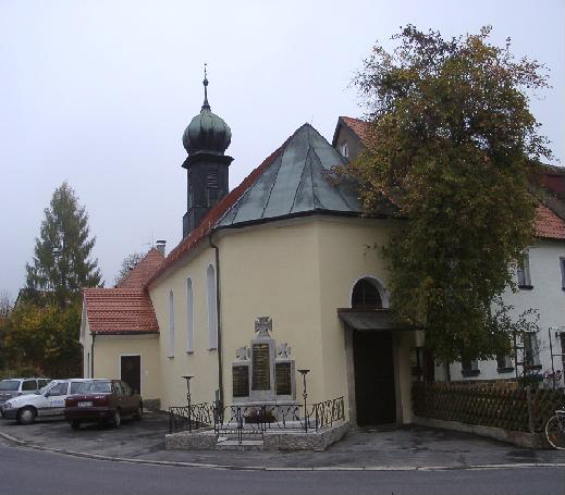 Riglasreuther Kirche